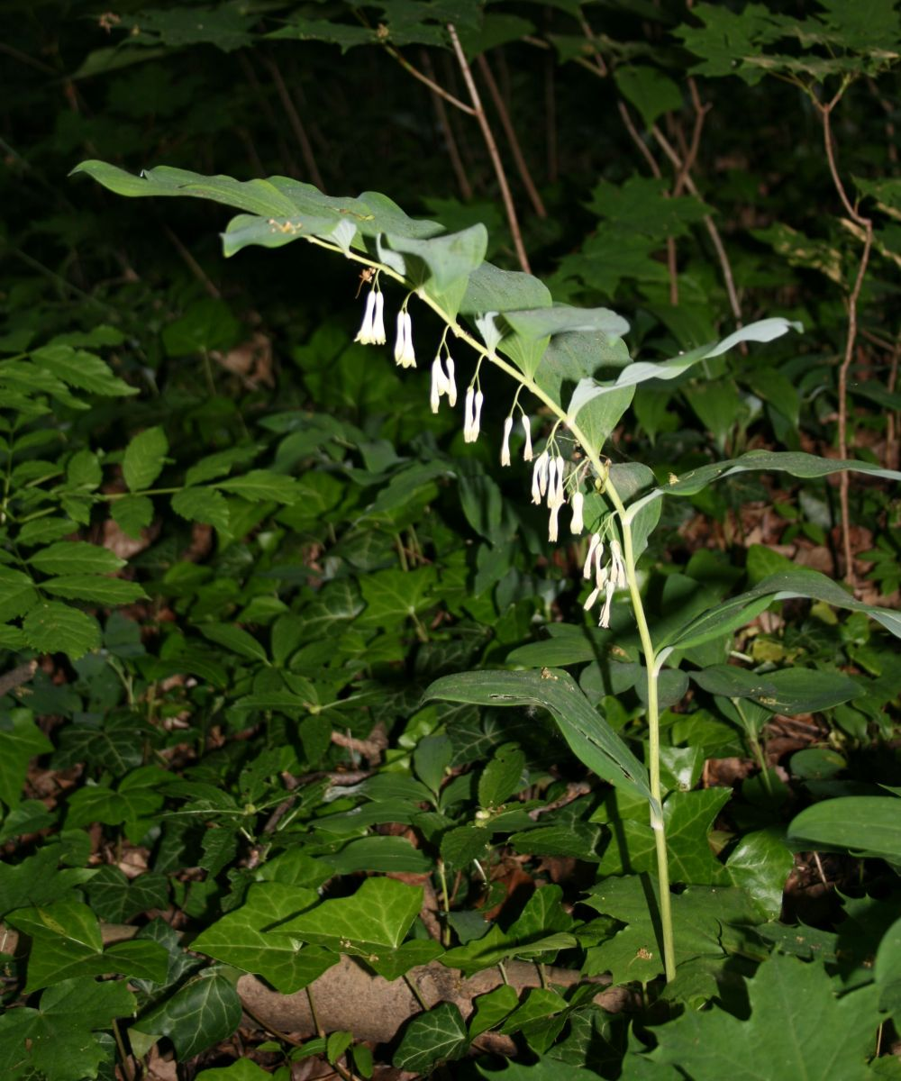 Vielblütige Weißwurz (Polygonatum multiflorum), Mäusedorngewächse (Ruscaceae) - Österreich/Austria/Autriche: Wien, Schönbrunn